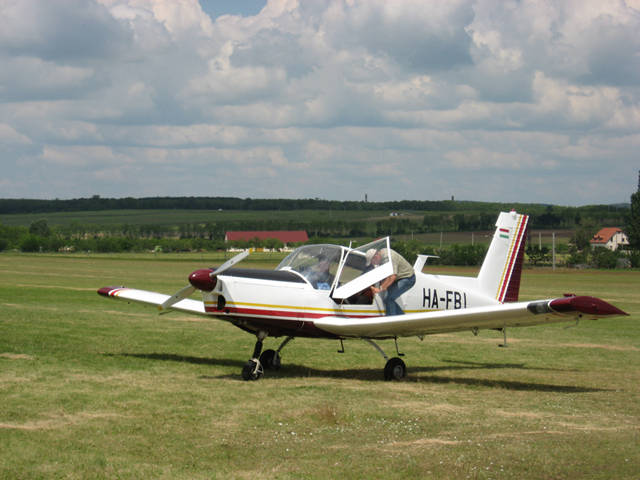 Zlin 43 repülőgép - Moravan Zlin 43